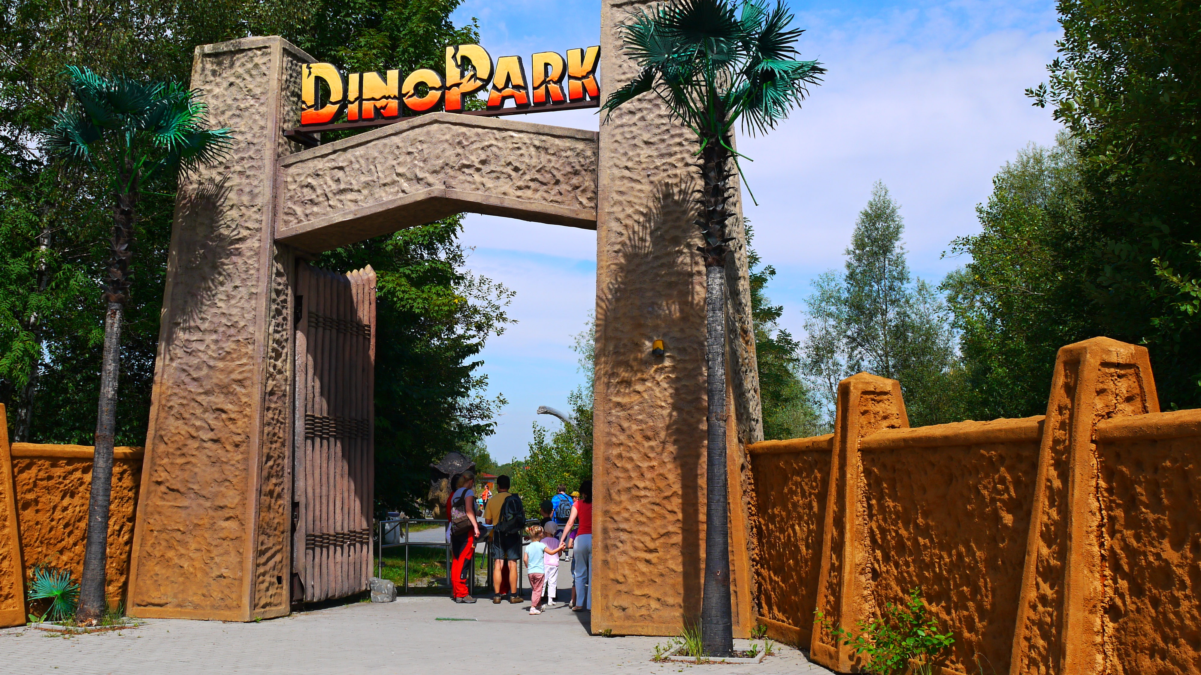 DinoPark Ostrava, Vstup